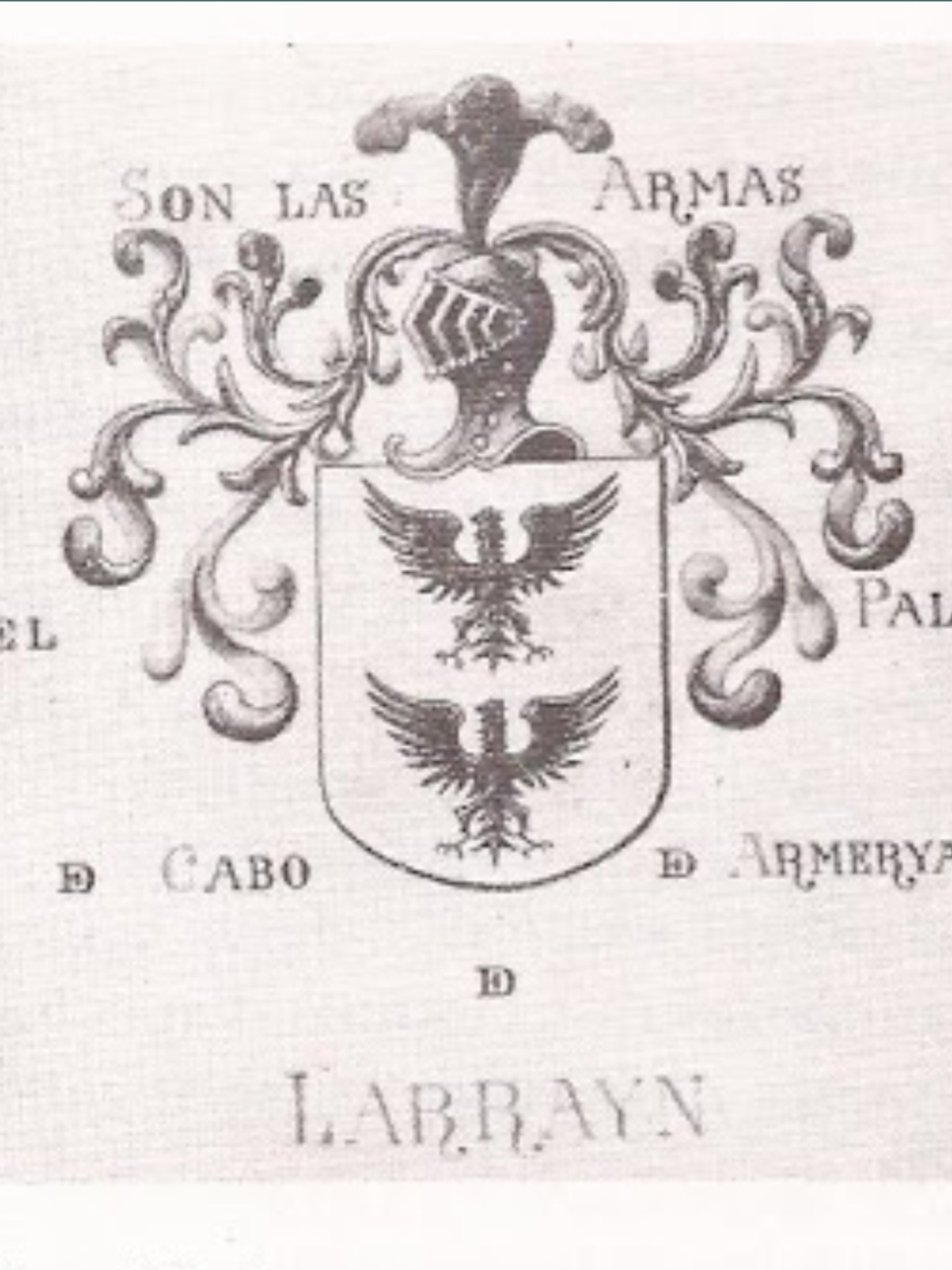 Escudo de arma del siglo XV, de la familia Larrain